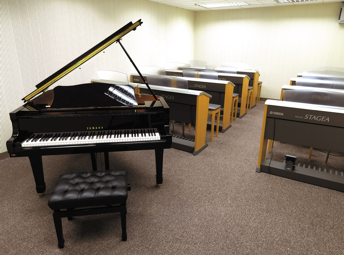 中文（香港）: 通利音樂中心裡其中一間的課室